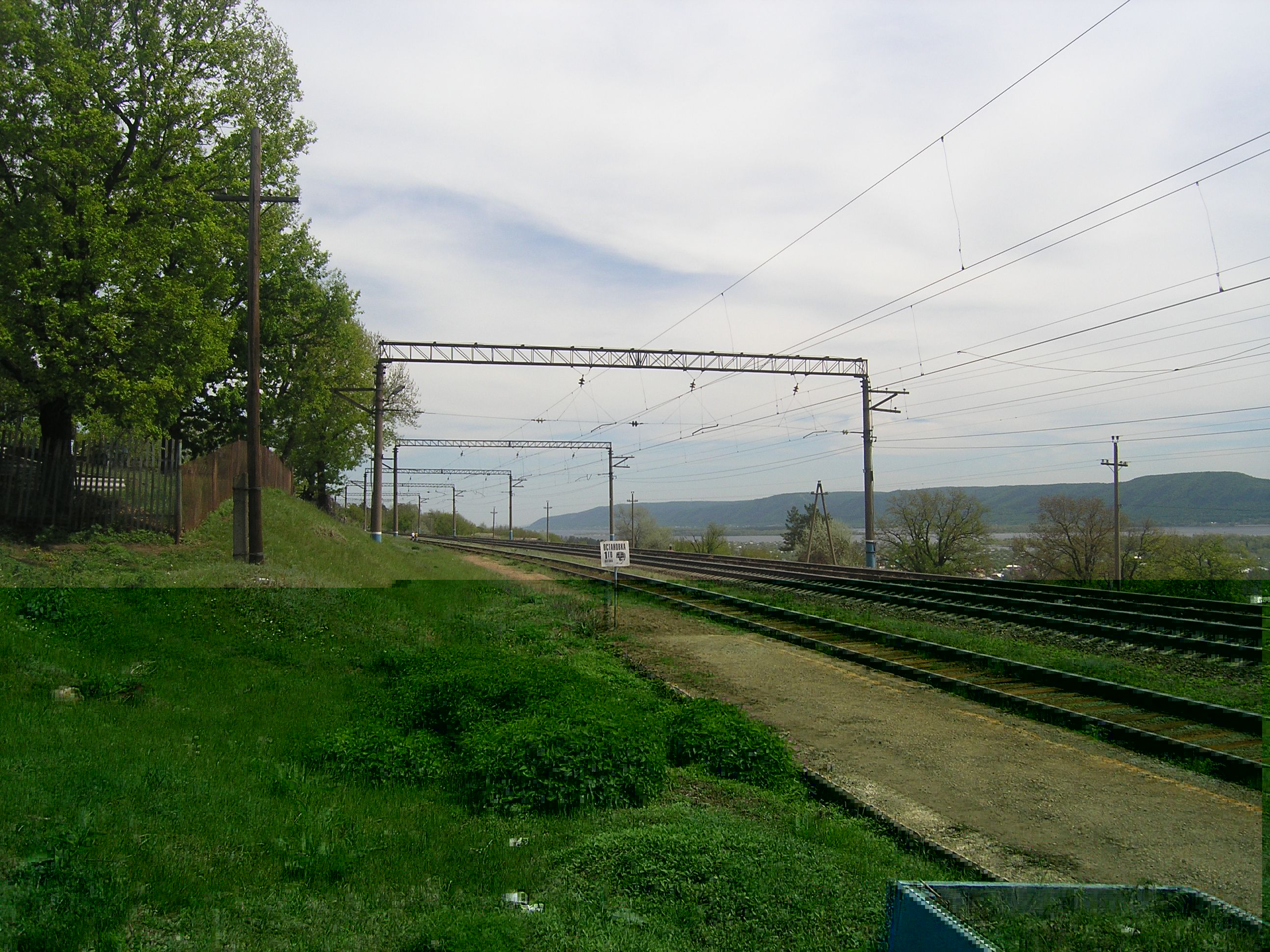 Пути у железнодорожной станции "Канал", Куйбышевская железная дорога